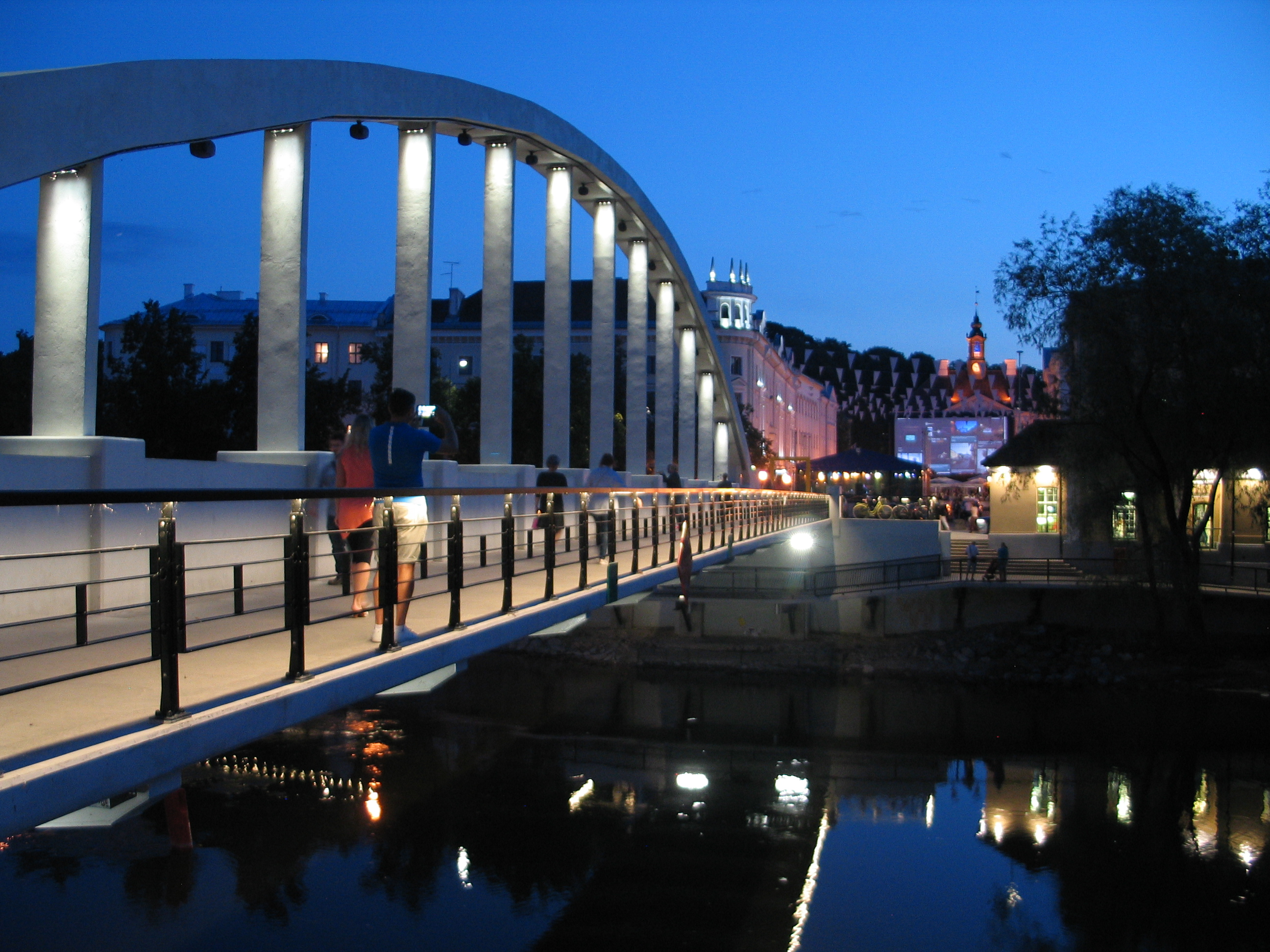 Арочный мост в Тарту летним вечером